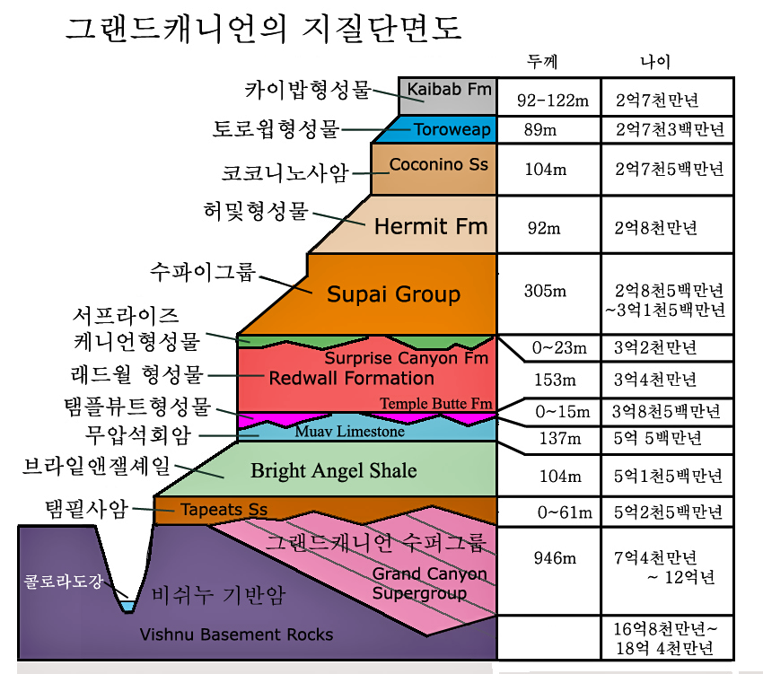 그랜드캐니언의 지질 단면도